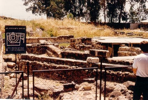 Kapernaum, am See Genezareth in Galiläa/Israel, archäologische Ausgrabungsstätte: Haus des Petrus in den römischen "Insulae" neben der Synagoge aus dem 1. Jhdt. n. Chr., hier soll Jesus von Nazareth eine Zeit lang gelebt haben